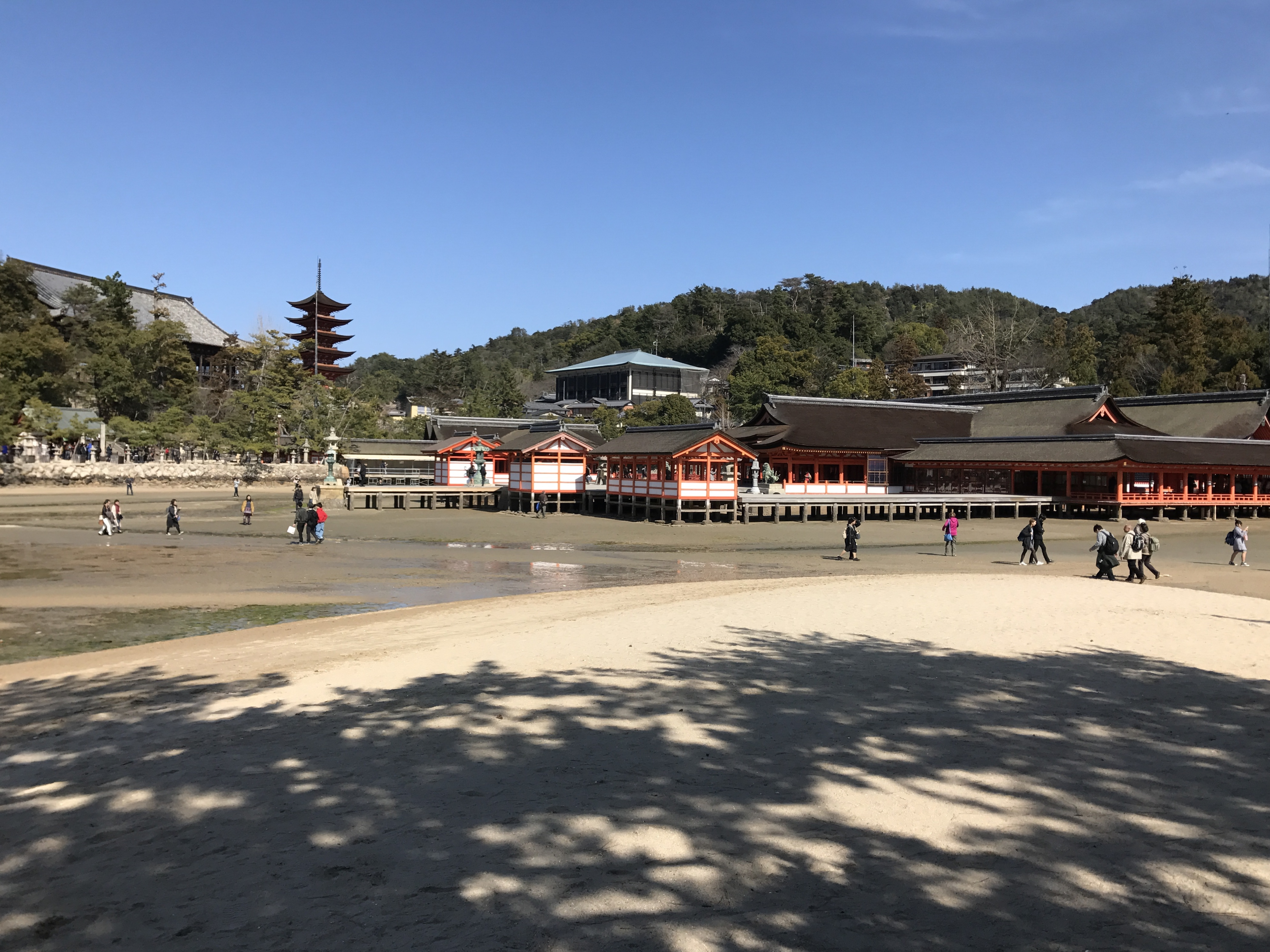 西側より望む厳島神社